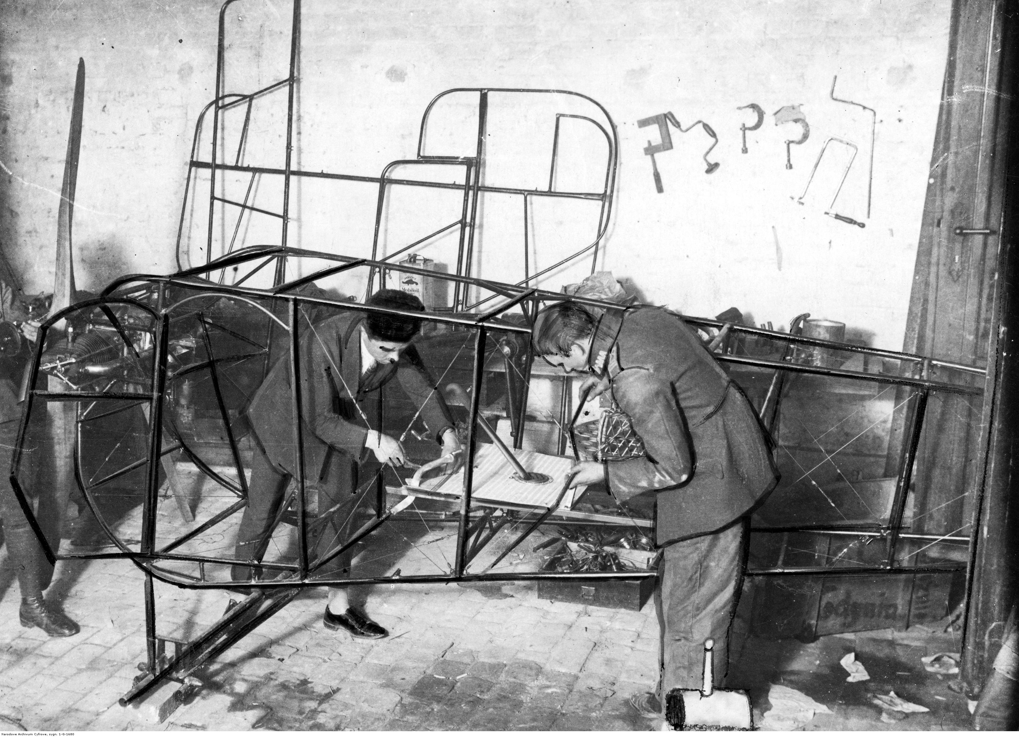 Bracia Stanisław i Mieczysław Działowscy podczas budowy samolotu sportowegoi DKD-I. Widoczny szkielet samolotu i silnik Haacke.